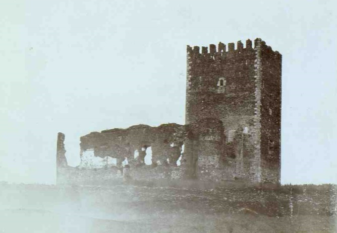 Fotografía antigua del castillo de Tejeda (Salamanca)